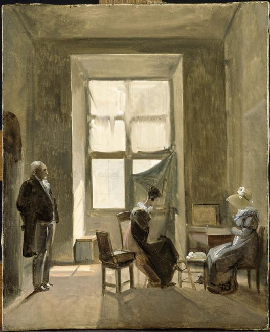 Huile sur toile